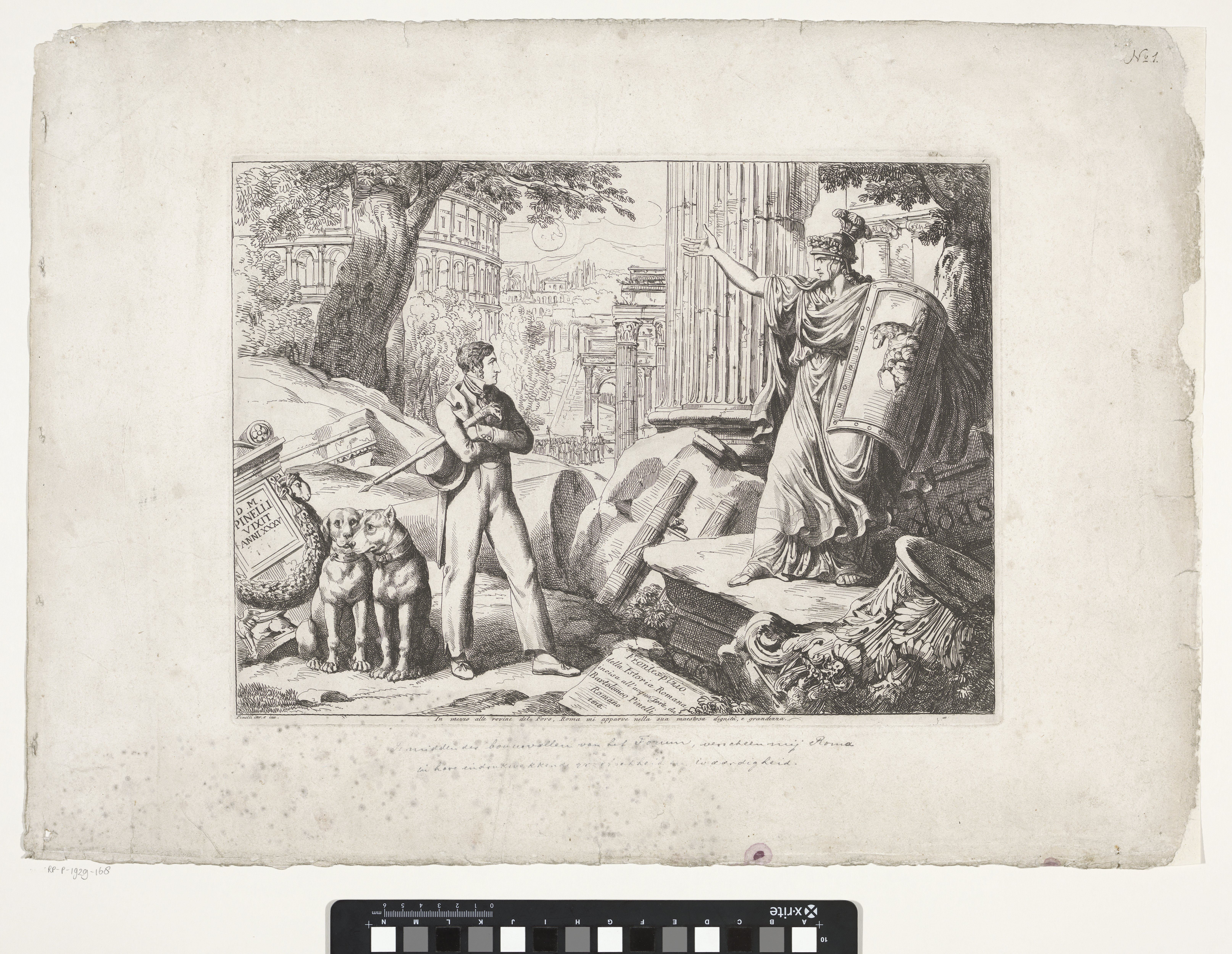 In mezzo alle rovine del Foro, Roma mi apparve ella sua maestosa dignità, e grandezza